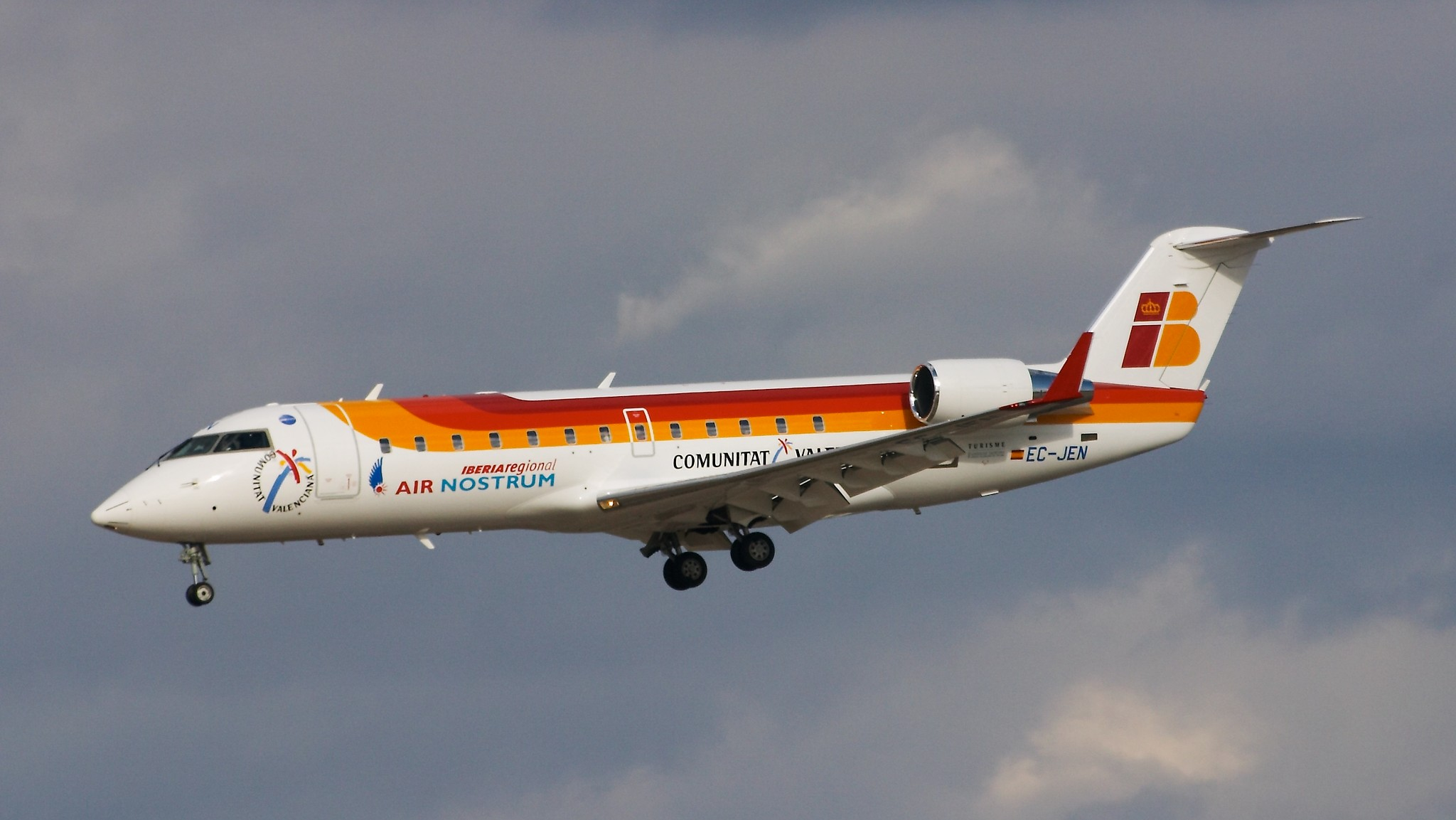 Canadair CRJ-200ER de Air Nostrum a punto de aterrizar en el aeropuerto de Madrid Barajas.